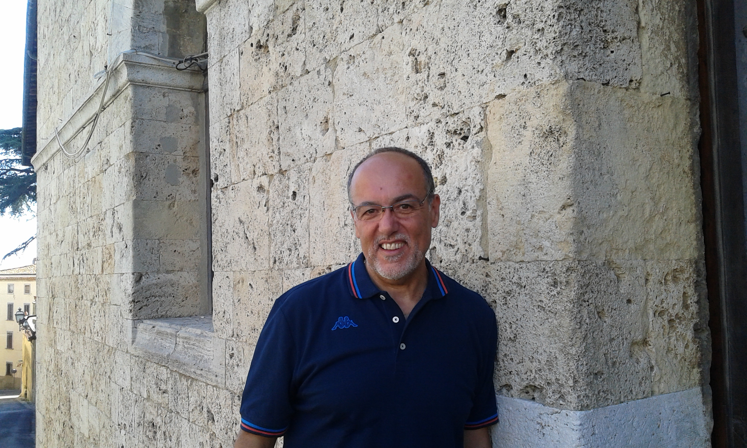 Massa Marittima - Massimo Sozzi davanti al Palazzo del Podestà